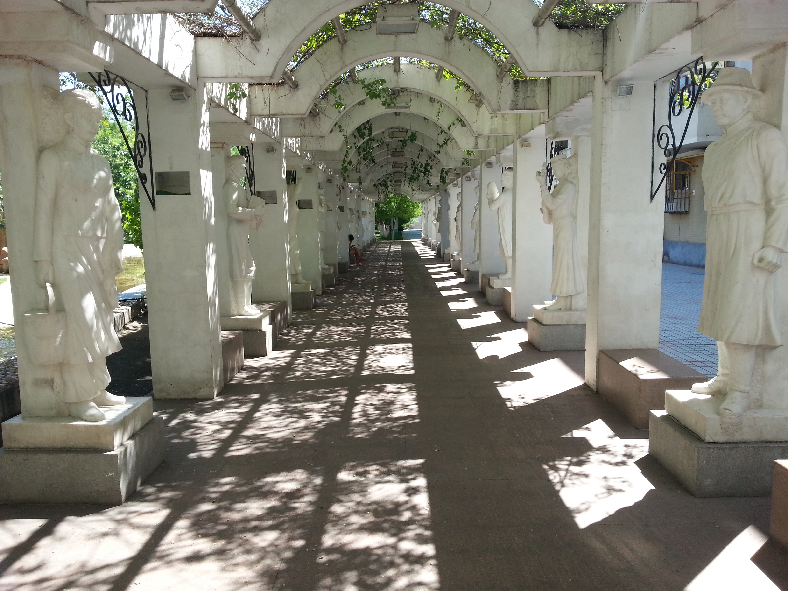 Ulike etniske grupper pressentert i Karamay_Cultural_Street